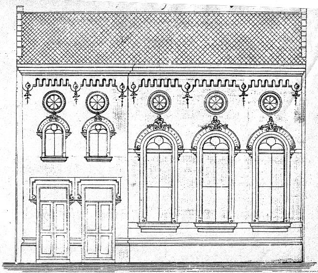 Проект південного фасаду Синагоги Ор шемеш, у Львові на вулиці Медовій, 3. Архітектор Саломон Рімер (1858—1931).